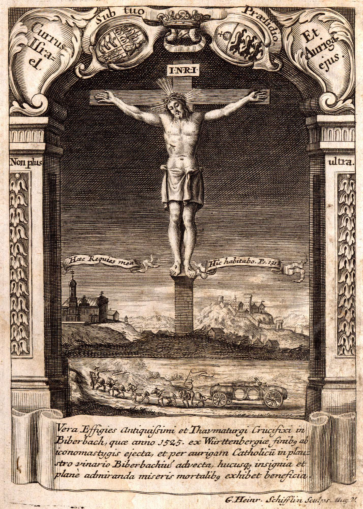 Frontispiz aus u.g. Werk. Abgebildet ist das Biberbacher Gnadenbild (Kruzifix), im Hintergrund links die Biberbacher Wallfahrtskirche (perspektivisch falsch, Turm auf der dem Betrachter zugewandten Seite), rechts die Burg Markt, direkt unter dem Kreuz Biberbach selbst. Im unteren Bildteil ist der Fuhrmann dargestellt, der das Gnadenbild nach Biberbach gebracht hat. Die Beschriftungen lauten: 'Currus Israel. Et Auriga Ejus.' - 'Der Wagen Israel. Und sein Fuhrmann.' 'Sub tuo Praesidio.' - 'Unter Deinem Vorsitz.' 'INRI' - 'Jesus von Nazareth, König der Juden' 'Non plus ultra.' - 'Nicht darüber hinaus.' 'Haec Requies mea. Hic habitabo. Ps. 131' - 'Hier ist meine Ruhstatt. Hier werde ich wohnen. Psalm 132.14 (Vulgata 131)' 'Vera Effigies antiquissimi et Thavmaturgi Crucifixi in Biberbach, quae anno 1525. ex Württenbergiae finibus ab iconomastygis ejecta, et per aurigam Catholicum in plaustro vinario Biberbachium advecta, hucusque insignia et plane admiranda miseris mortalibus exhibet beneficia.' - 'Wahres Abbild des sehr alten und wundertätigen Kreuzes in Biberbach, das, im Jahre 1525 aus württembergischen Gebiet von Bilderstürmern hinausgeworfen und durch einen katholischen Fuhrmann in einem Weintransportwagen nach Biberbach gefahren, bisher Zeichen seiner Macht und für die armen Sterblichen deutlich zu bewundernde Wohltaten sehen läßt.' 'G.Heinr. Schifflin Sculps. Aug V.' - 'G. Heinrich Schifflin hat es graviert. Augsburg'